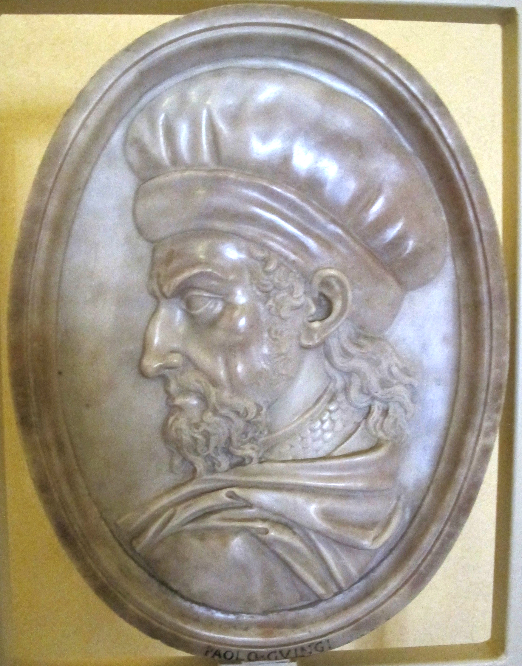 Museo nazionale di Villa Guinigi - MIBAC This is a photo of a monument which is part of cultural heritage of Italy.